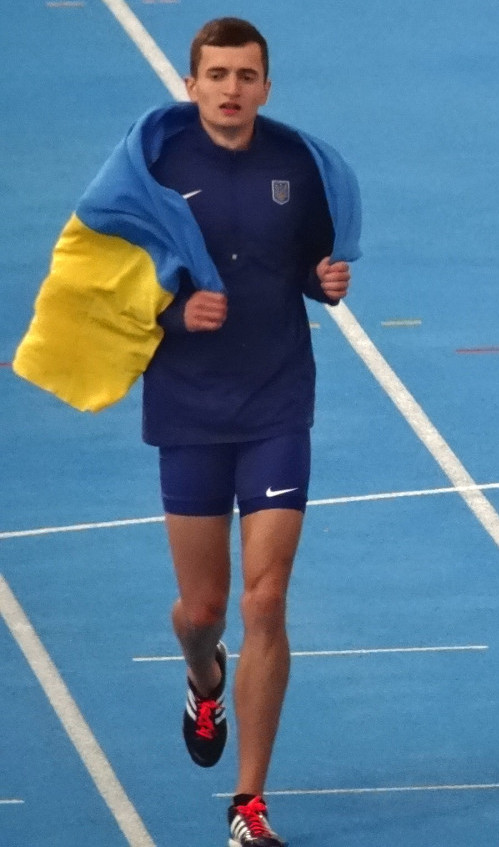 Młodzieżowe Mistrzostwa Europy w Lekkoatletyce U23 w Bydgoszczy 13-16 lipca 2017, bieg na 5000 m mężczyzn